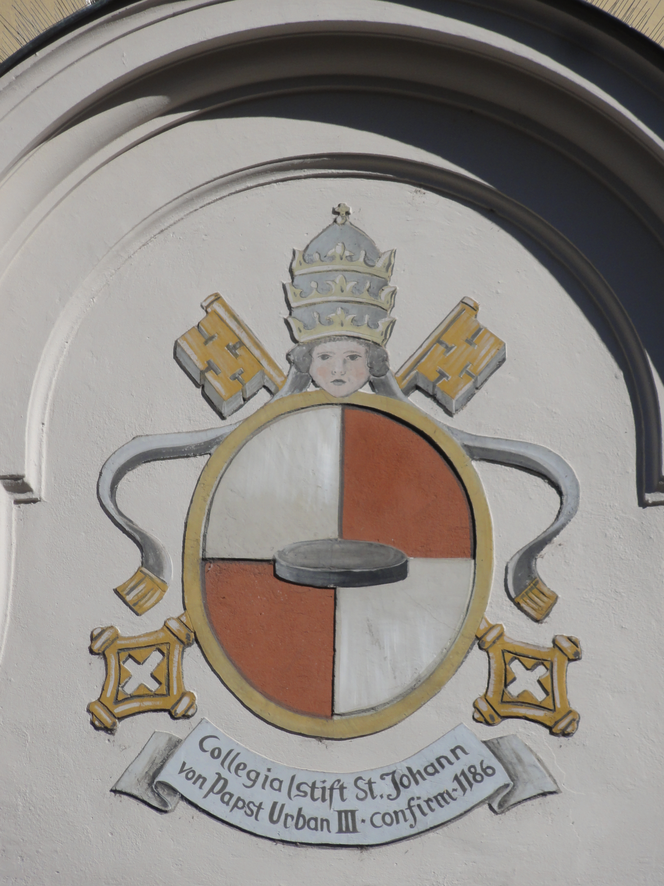 Regensburg - Stiftskirche St. Johann (Päpstl. Wappen)